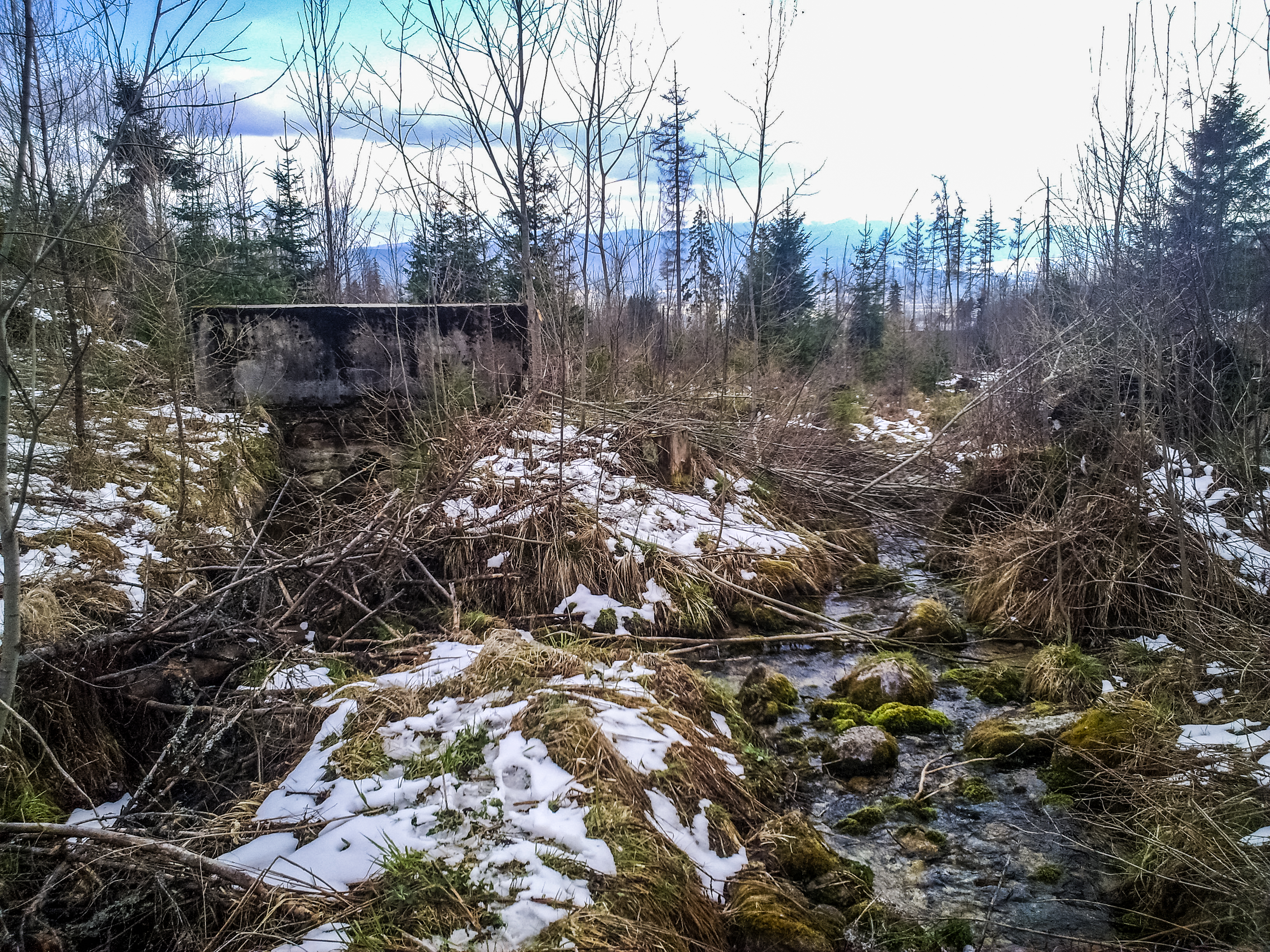 Vľavo nádrž a múr s vtokom niekdajšej spádovej elektrárne, vpravo potok Malý Šum